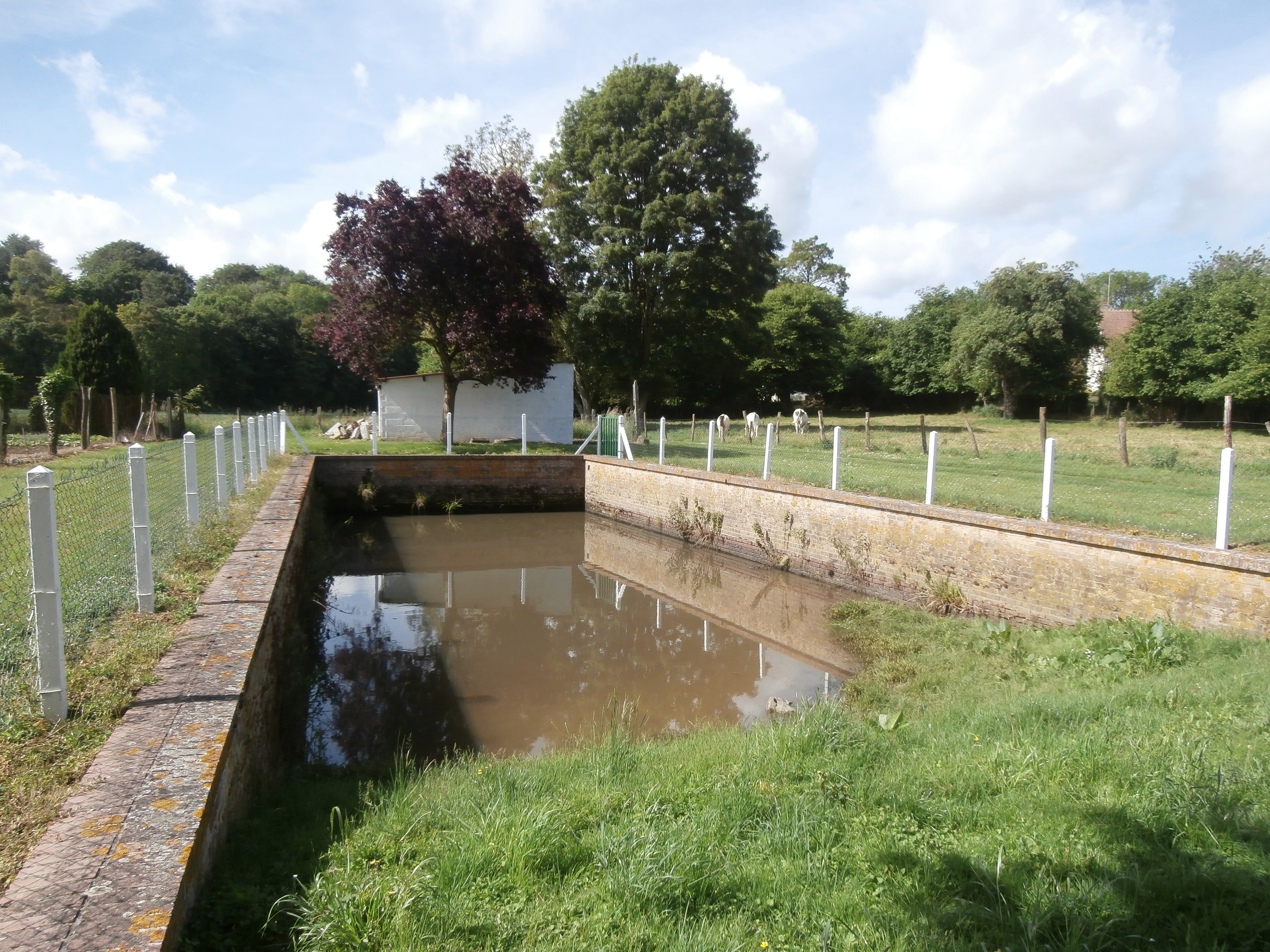 Mare communale de Rémécourt (60), rue de la mairie.